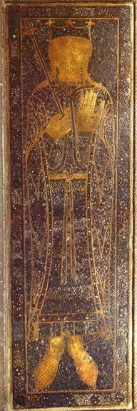 Fredegonde